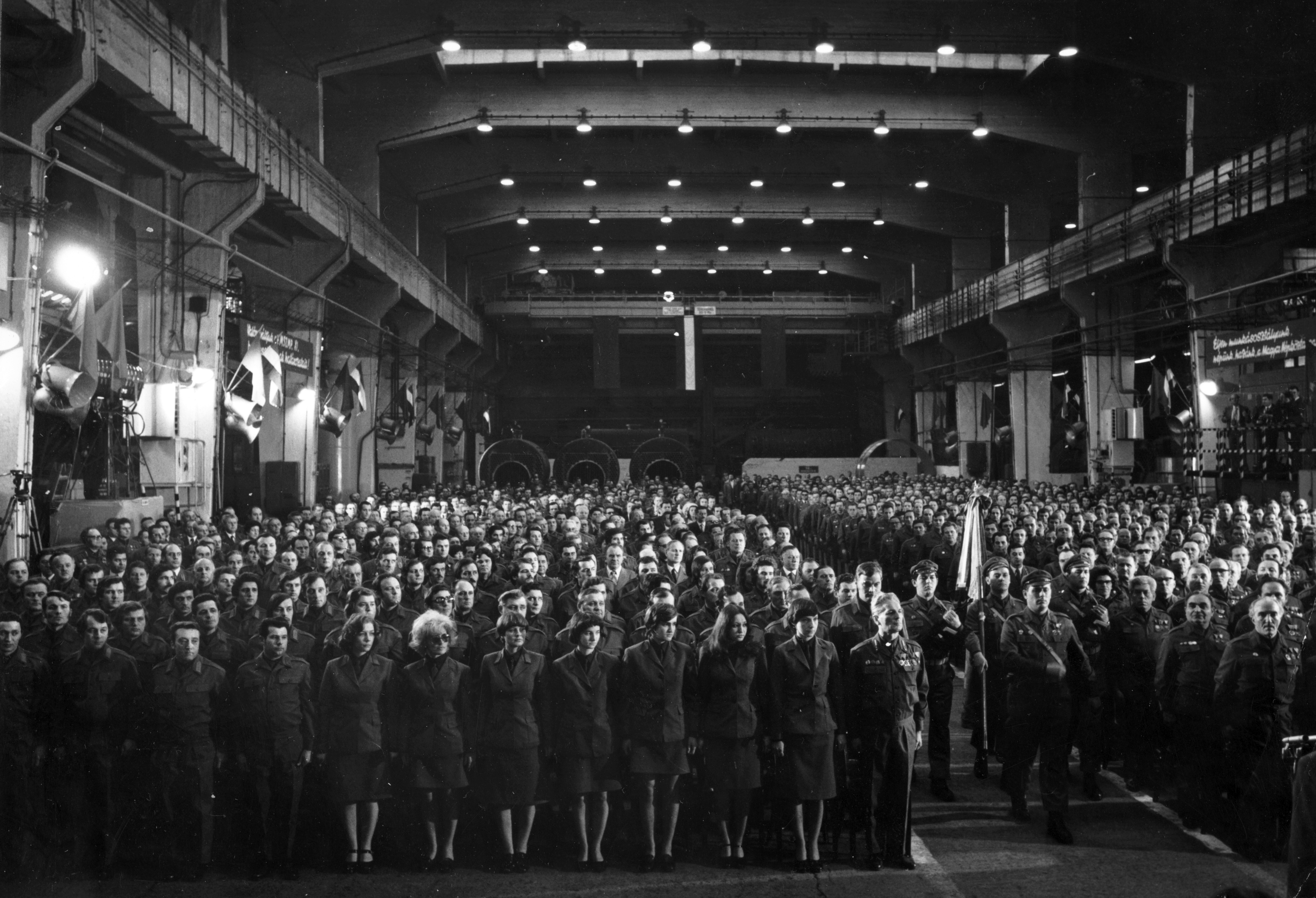 Váci út 152-156., Láng Gépgyár, vegyipari szerelőcsarnok, munkásőr rendezvény. Location: Hungary, Budapest XIII. Tags: Workers' Militia, factory, tableau, Budapest Title: Váci út 152-156., Láng Gépgyár, vegyipari szerelőcsarnok, munkásőr rendezvény.